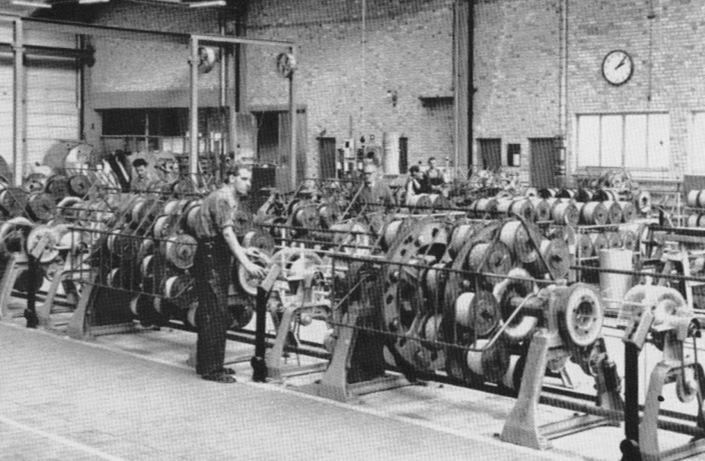 Nya kabelverket.